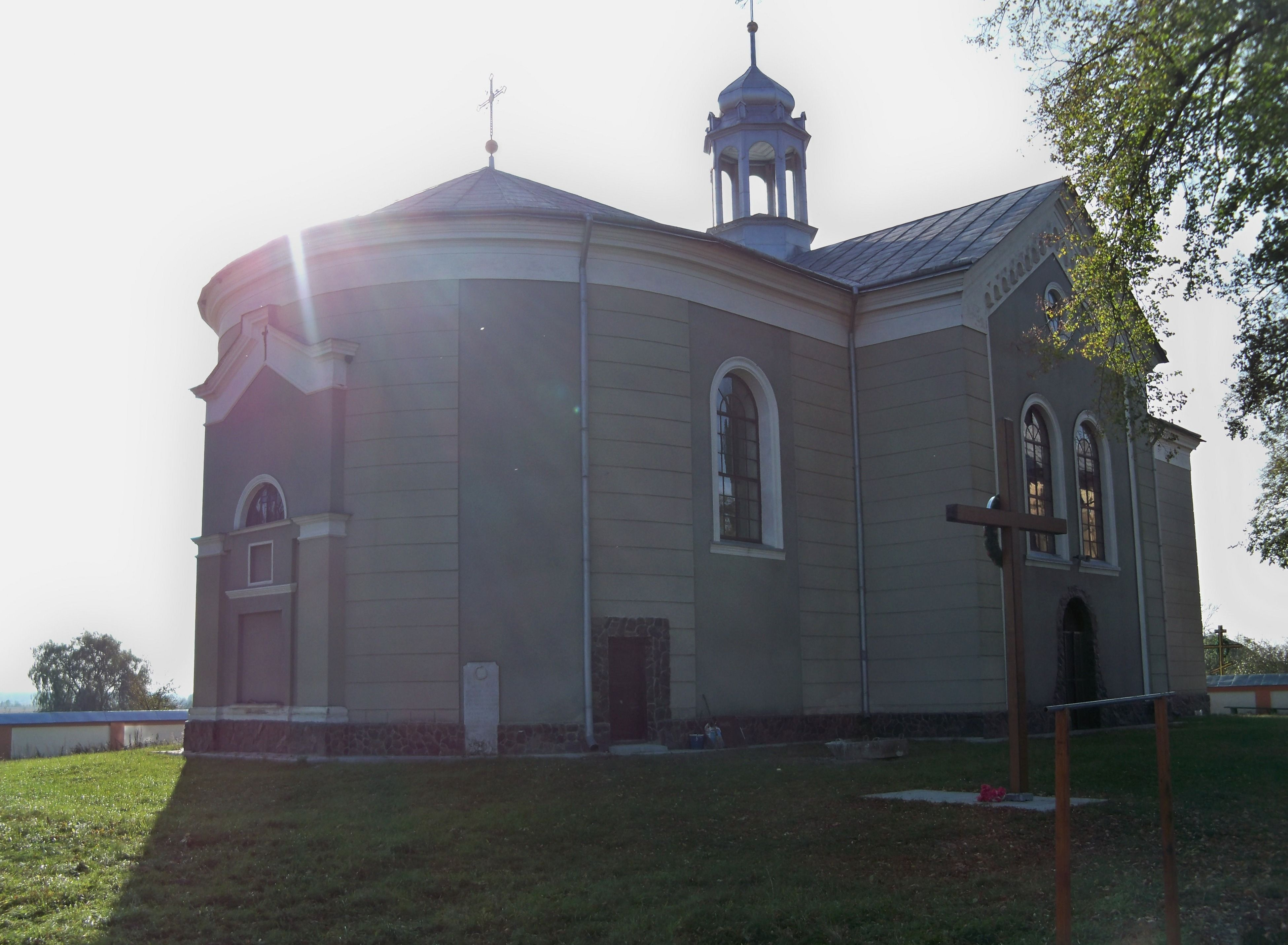 Каплиця, с.Бутини